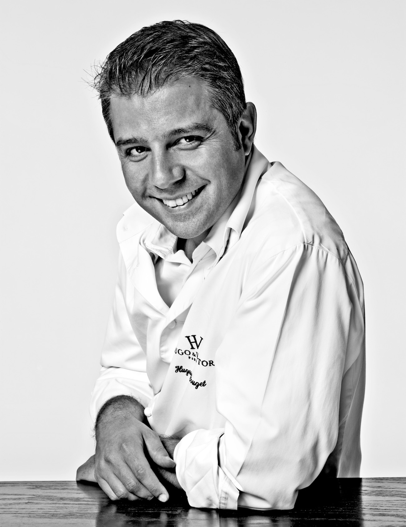 Créateur de la maison Hugo & Victor